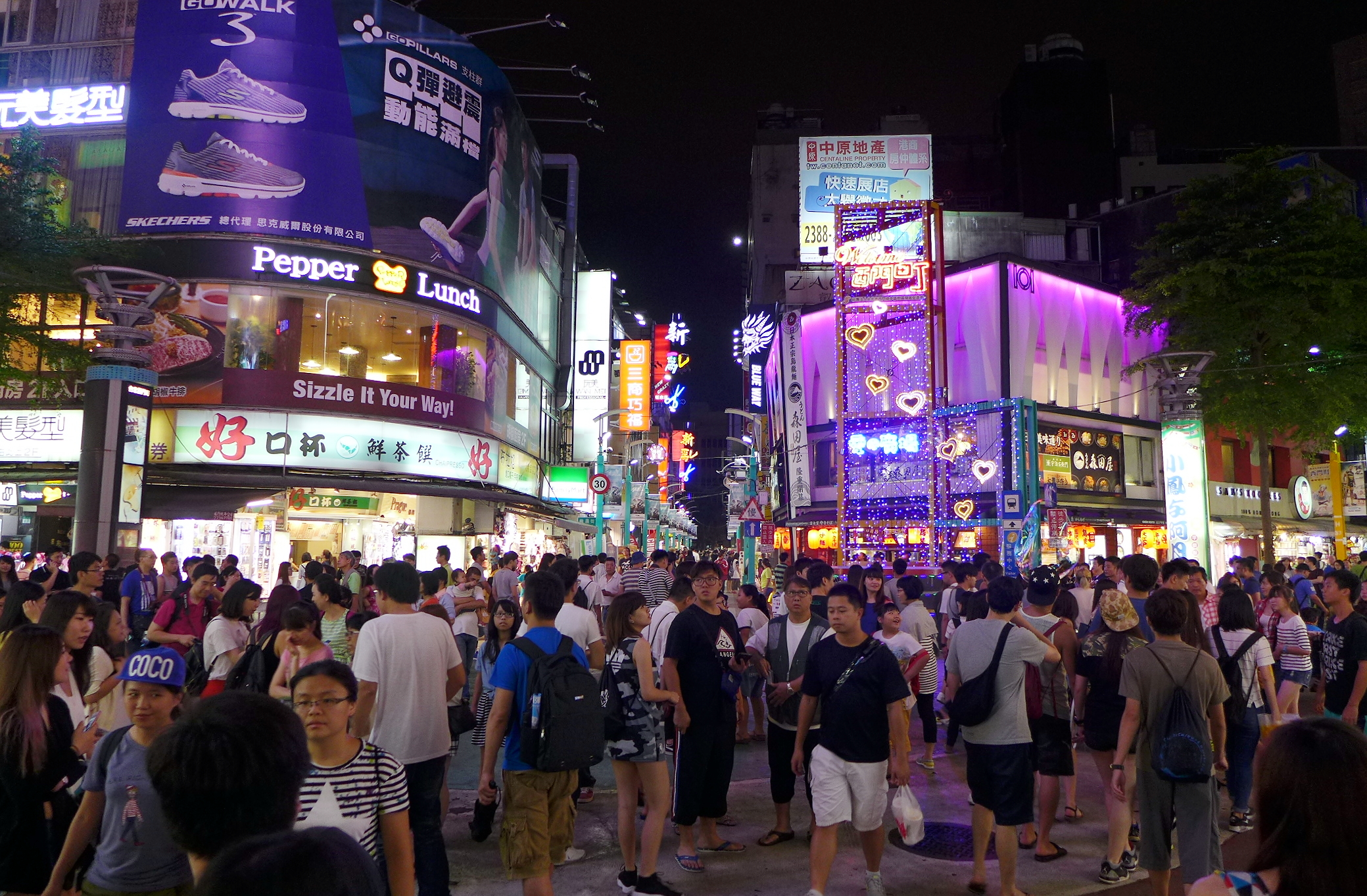 西門町徒步區夜景